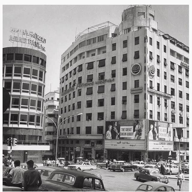 صورة تاريخية لساحة رياض الصلح في بيروت عام 1971